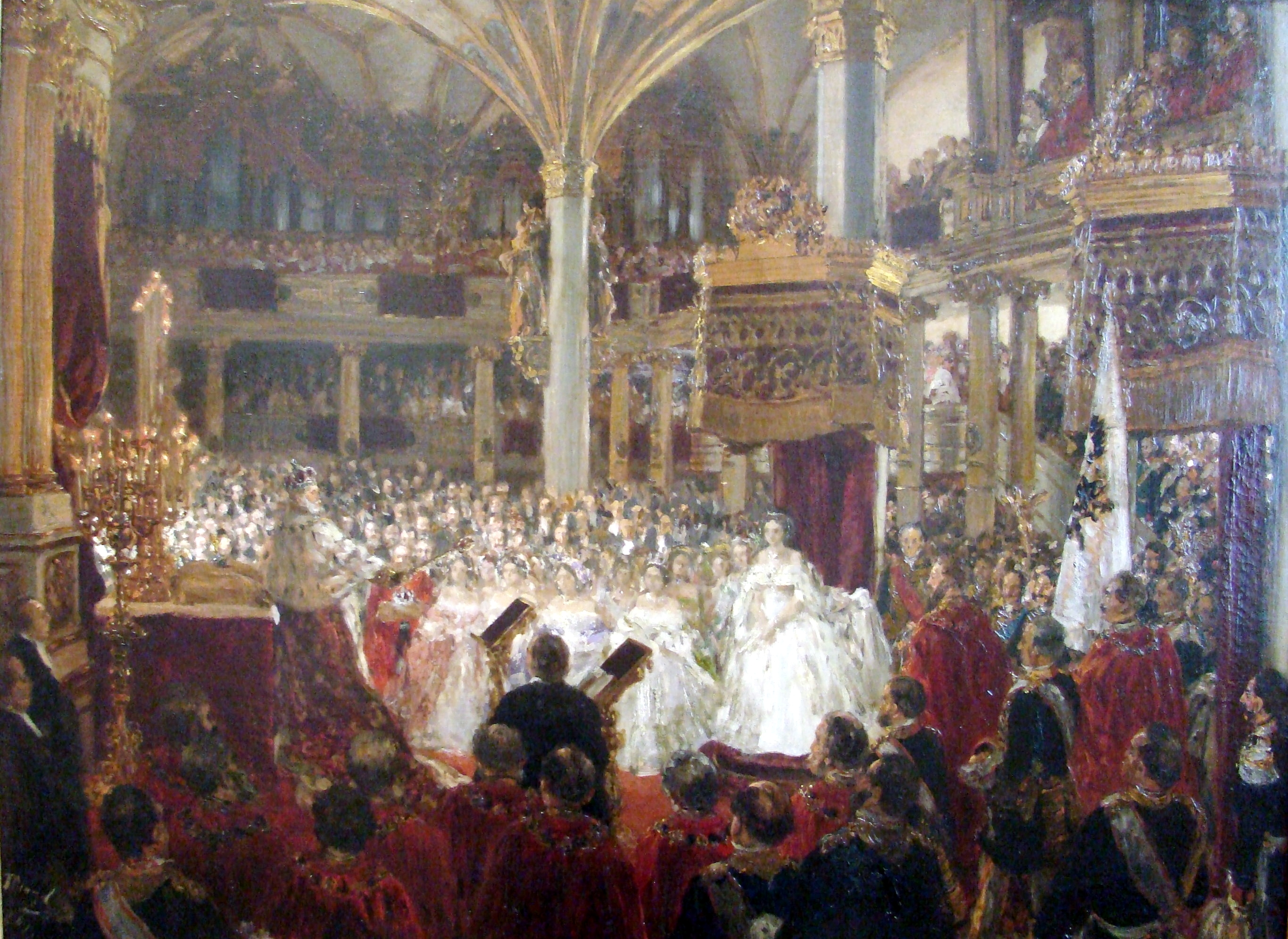 Krönung Wilhelm I. in Königsberg im Jahre 1861 (Skizze)